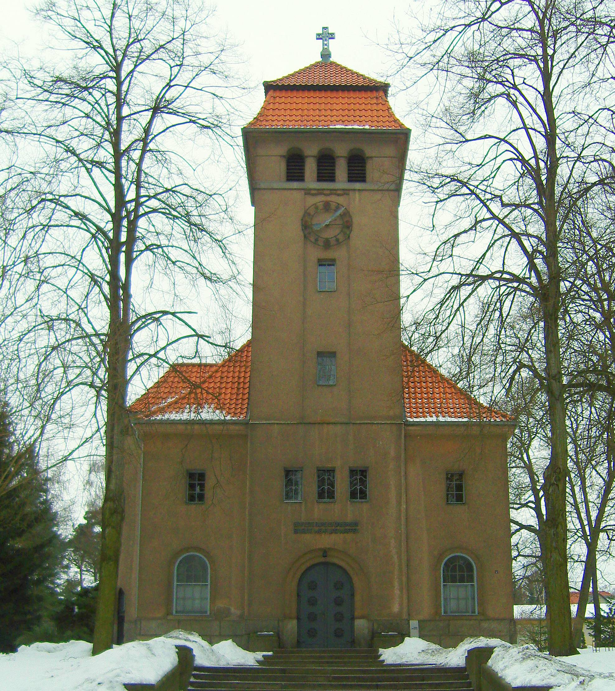 Friedensgedächtniskirche in Lauchhammer; Baudenkmal, 1996 profaniert